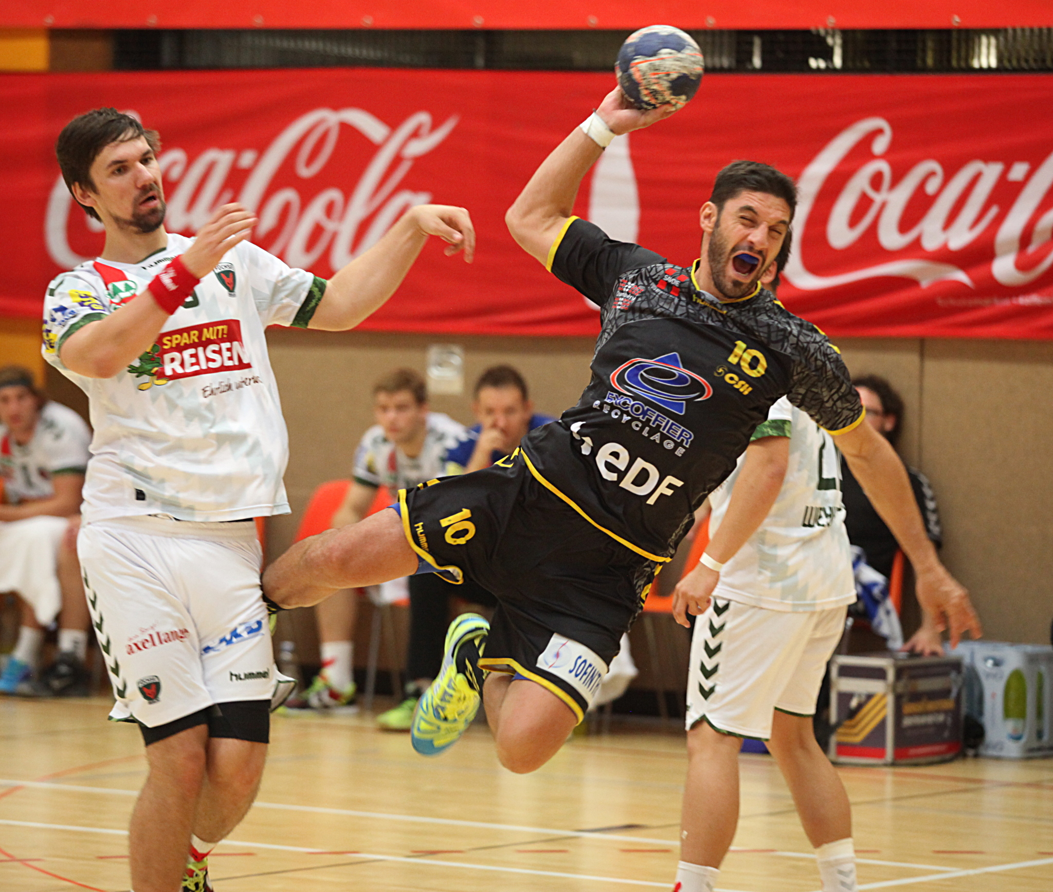 Bertrand Gille, Handballspieler von Chambéry Savoie Handball am 16. August 2014 beim Sparkassen-Cup in Ehingen.